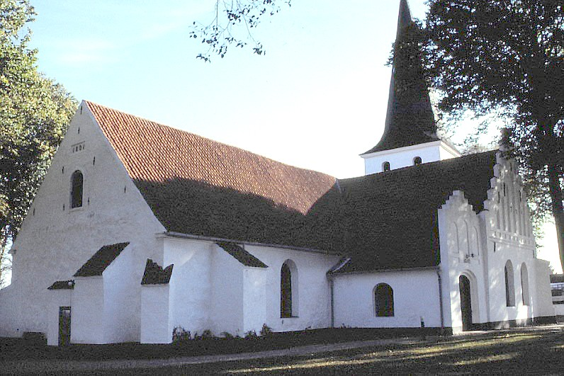 Bogense Kirke i Danmark. Bogense kirke